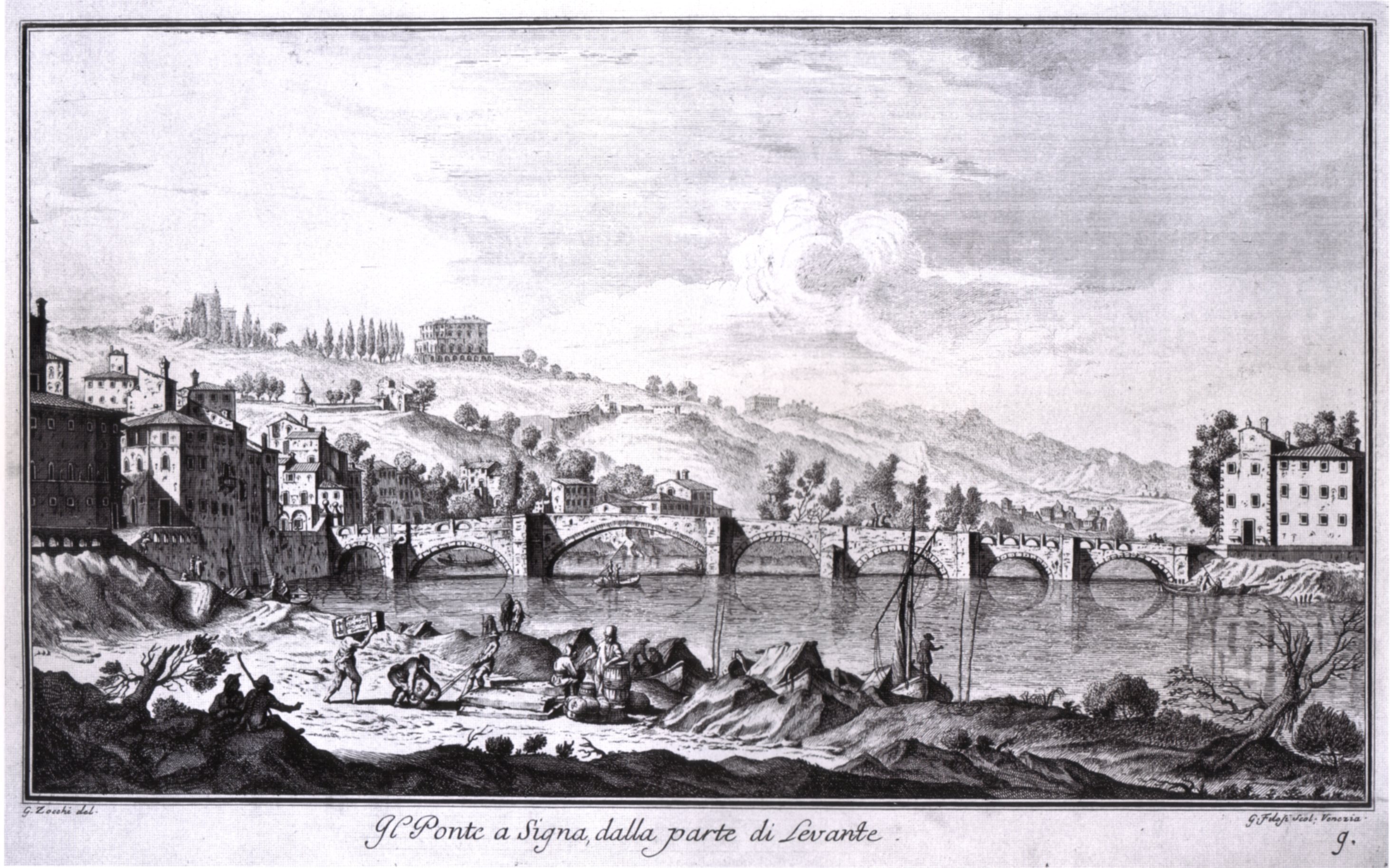 Zocchi, ville 11 ponte di signa da levante